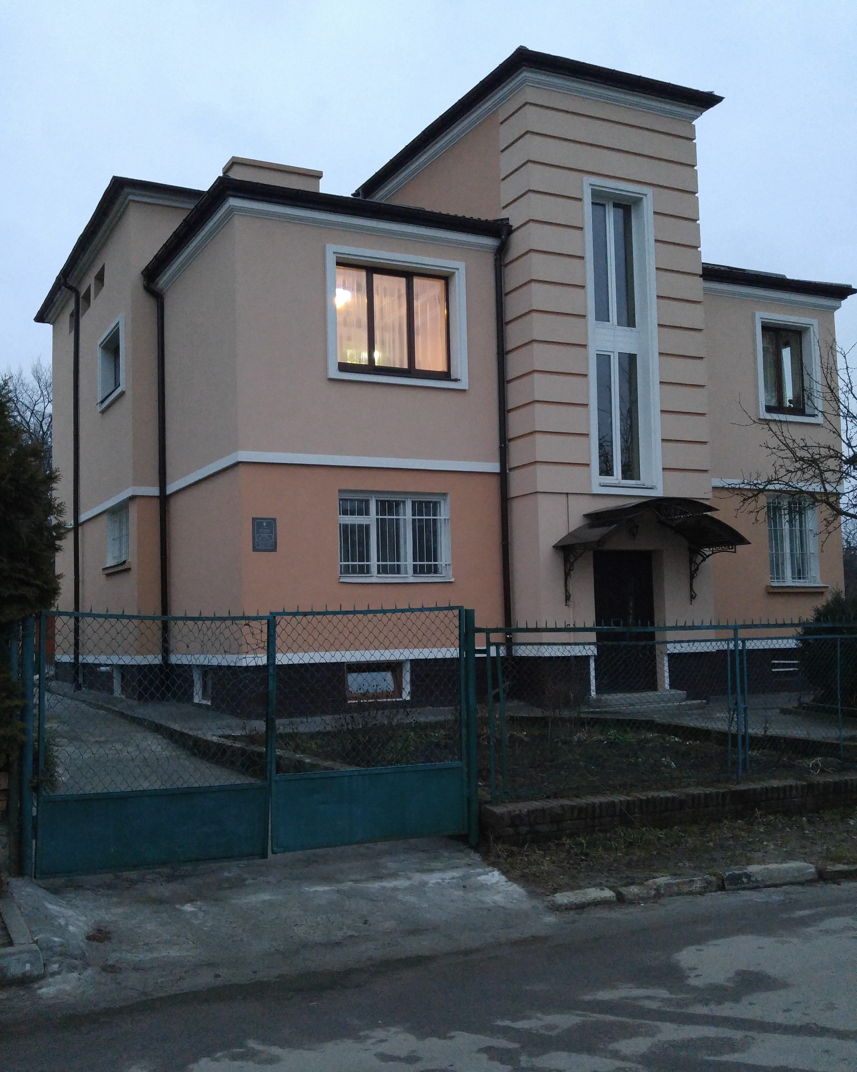 Вілла за проектом Тадеуша Врубеля на вул.Кибальчича, 15. Памятка архітектури Львова, Україна, 1932.